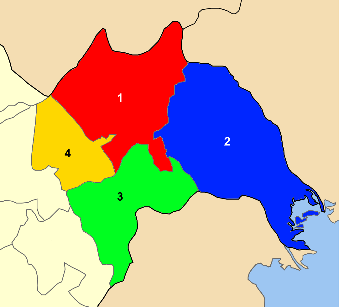 Χάρτης των ενοτήτων (και πρώην δήμων) από τις οποίες αποτελείται ο Δήμος Αλεξάνδρειας